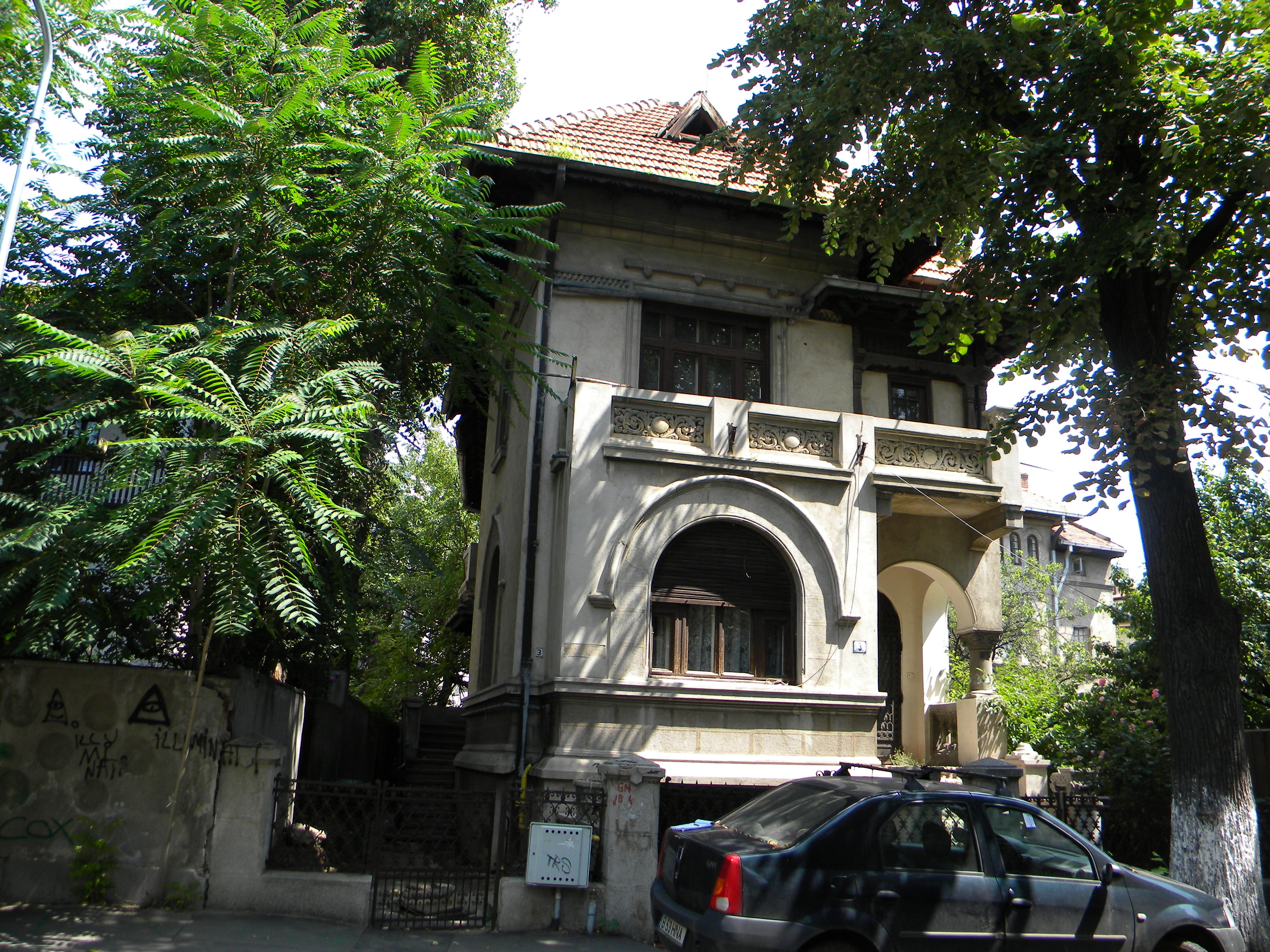 Bucuresti, Romania, Str. Haga, Vila nr. 3; B-II-m-B-18893